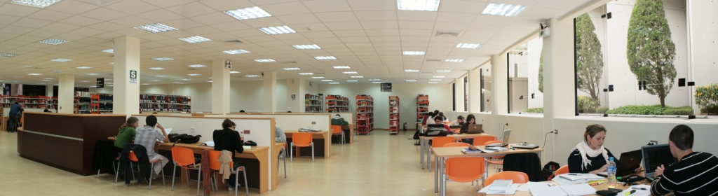 Centro de Recursos para el Aprendizaje, la Investigación y la Docencia (CRAID)